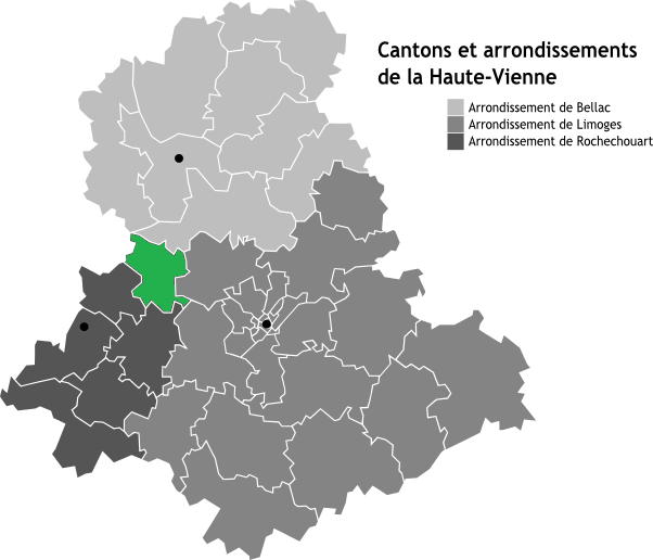 Canton de Saint-Junien-Est, Limousin, France en Carte des arrondissements de la Haute-Vienne